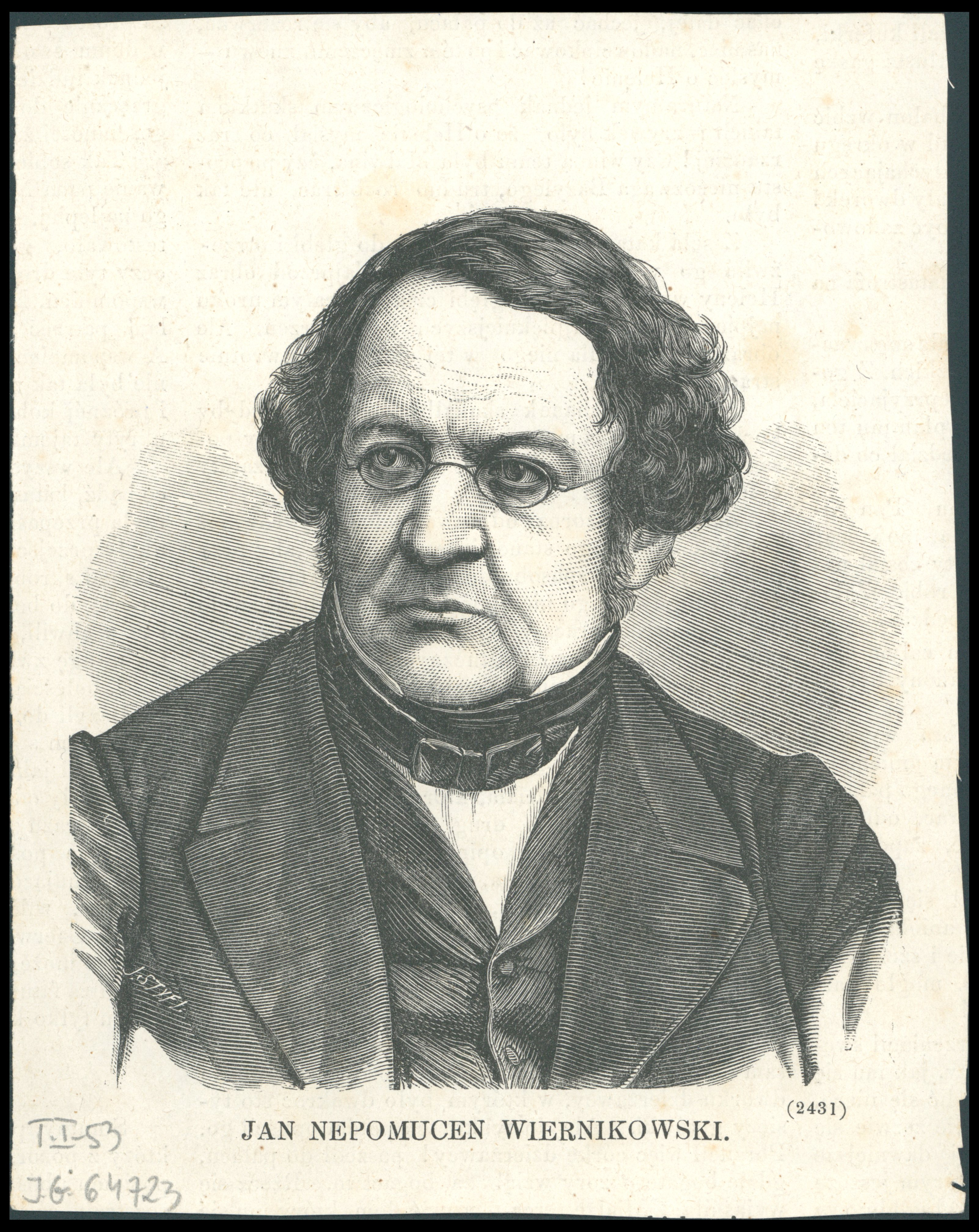 Jan Nepomucen Wiernikowski